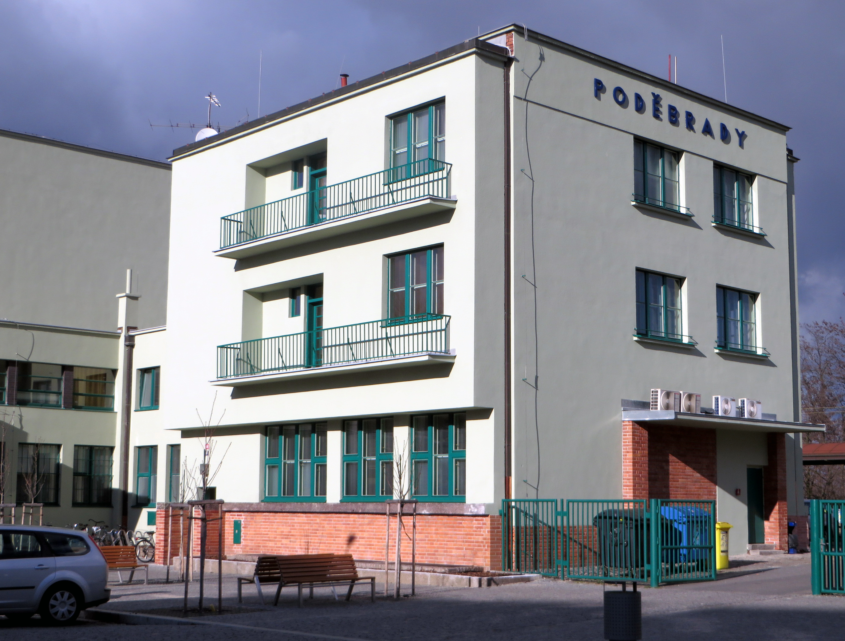 Železniční stanice Poděbrady po rekonstrukci.